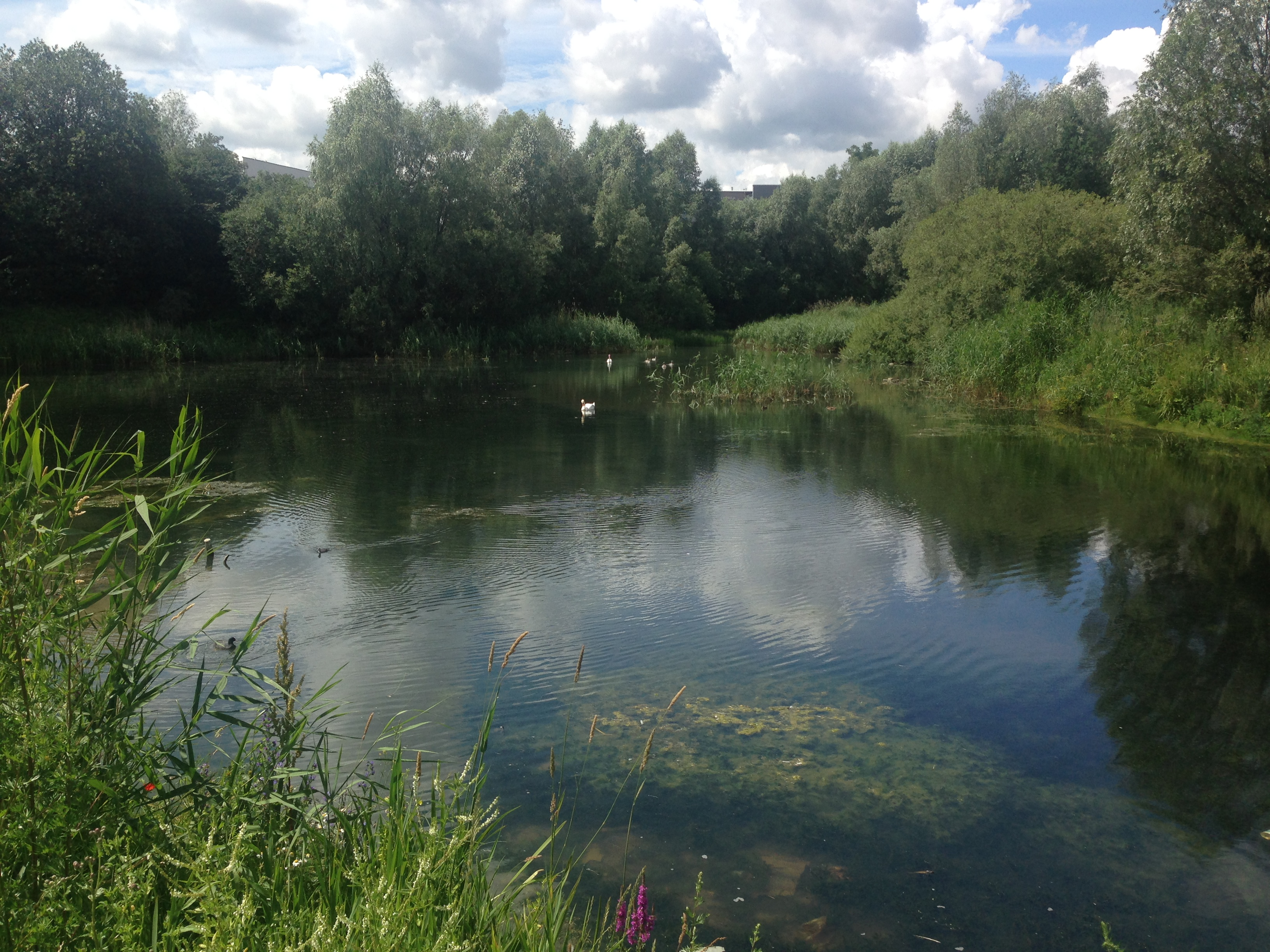 Piecki-Migowo. Staw Piekarnicza, miejsce spacerów mieszkańców i siedlisko ptactwa wodnego.